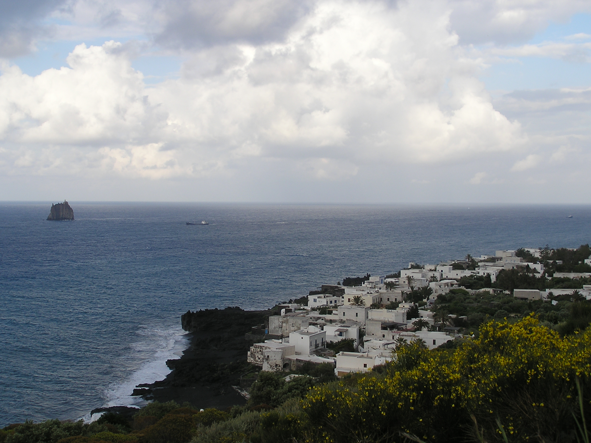 pohled na pobřeží městské části Piscitá